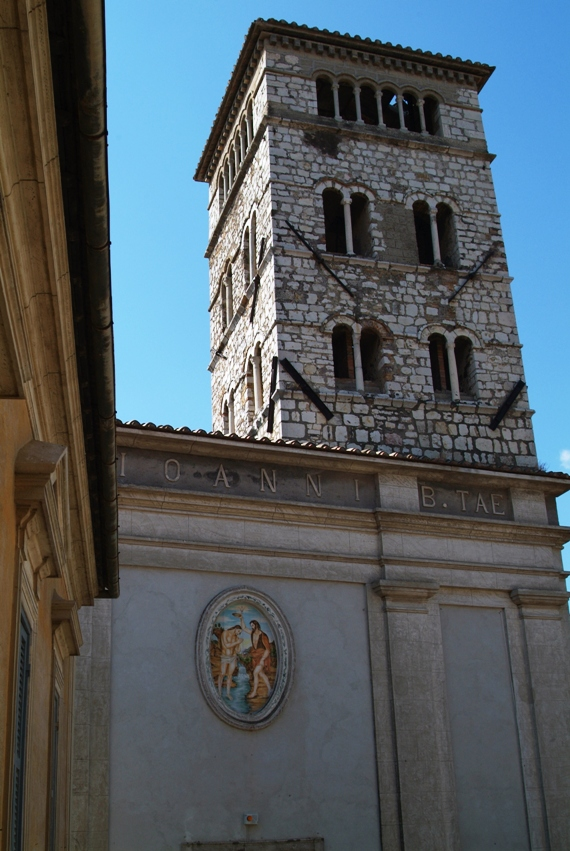 Facciata della chiesa di S. Giovanni Battista, patrono di Casperia